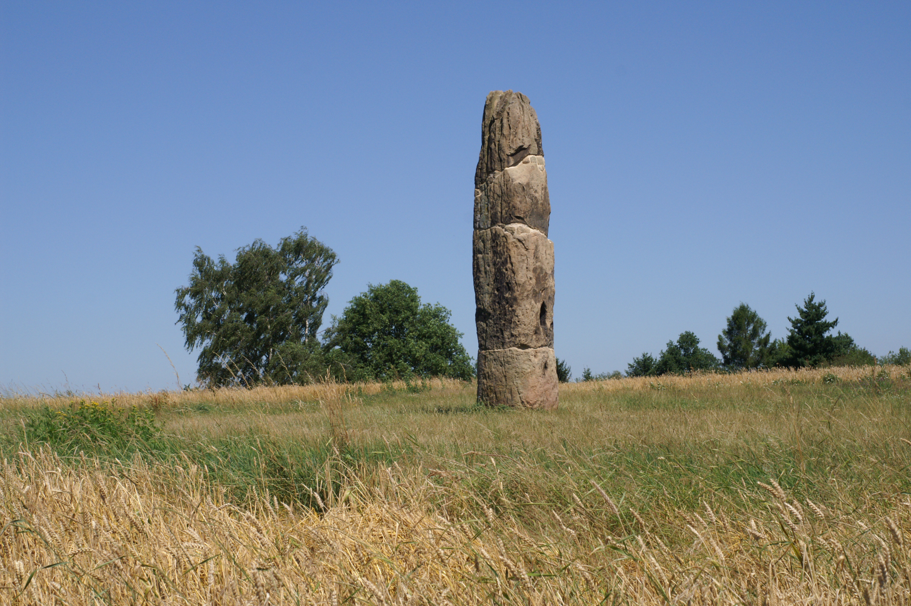 Gollenstein bei Blieskastel (Deutschland, Saarland), einer der größen Menhire in Deutschland